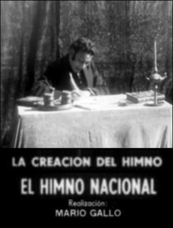 Poster de La creación del himno